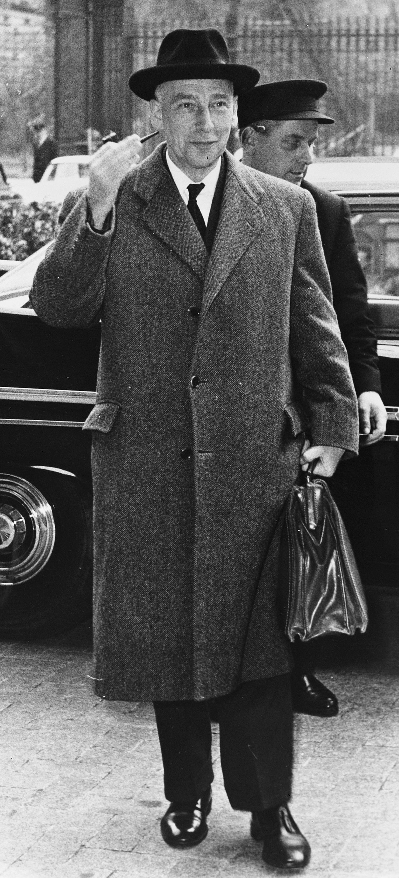 Belgische Minister De Schrijver naar Kongo